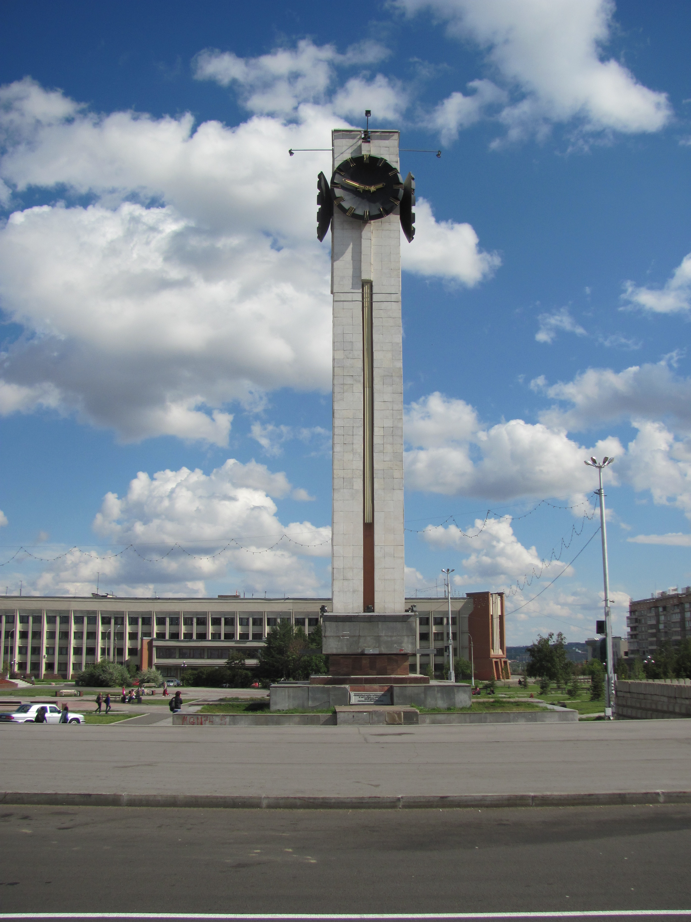 Фото магнитогорских городских часов, установленных в 1979 году, в честь пятидесятилетия города